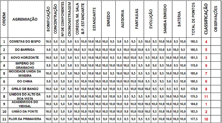 Resultados dos Blocos A - RJ 2020